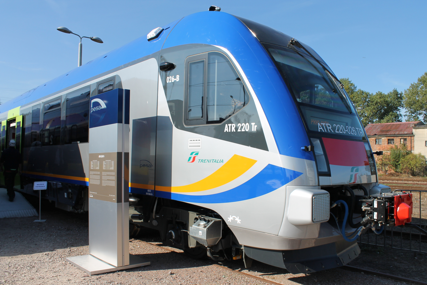 Spalinowy zespół trakcyjny ATR220-026Tr podczas targów Trako 2015. The making of this document was supported by Wikimedia Polska Association, within Wikigrant no. WG 2015-34.